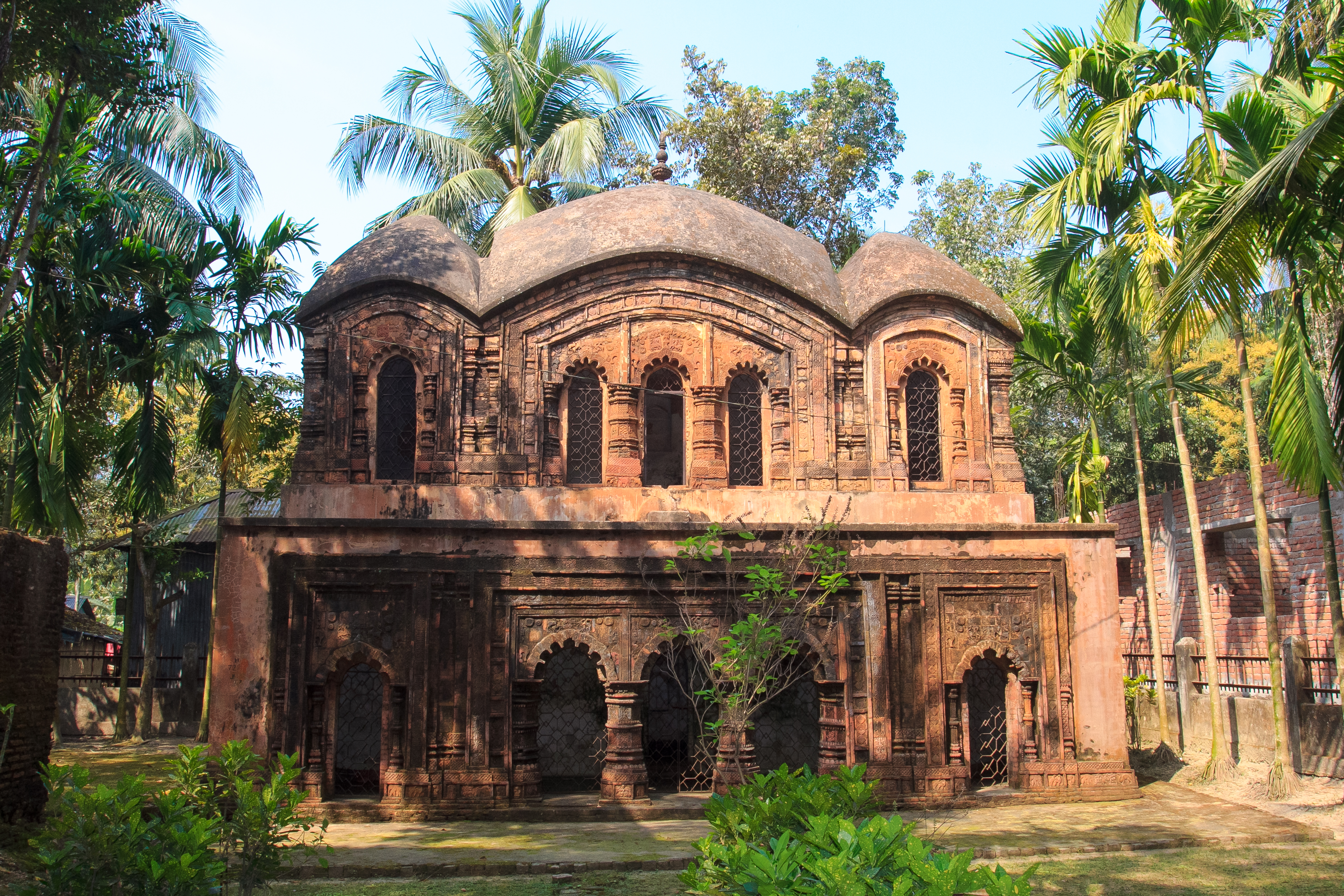 রাজারাম মন্দির